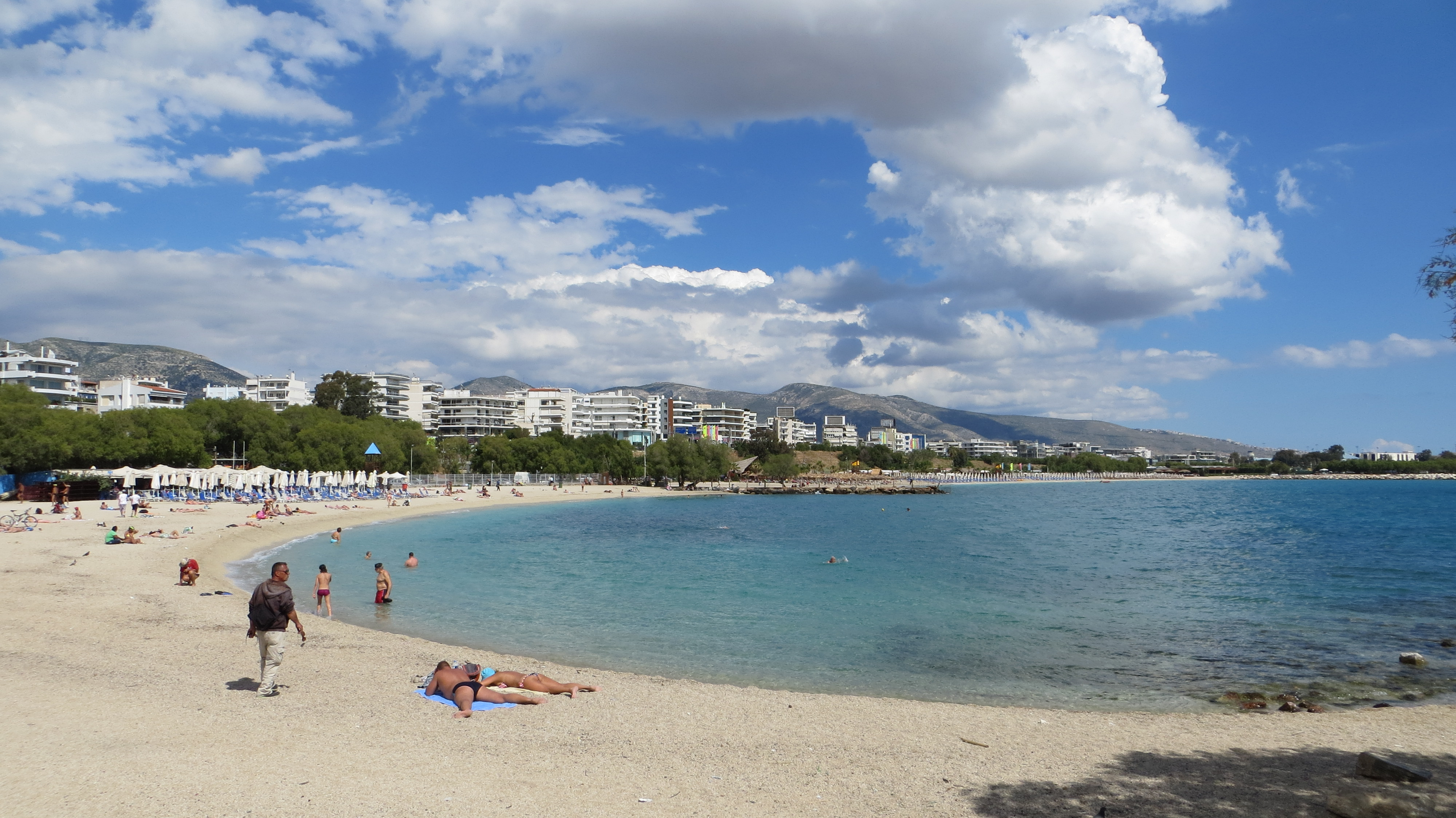 Alimos